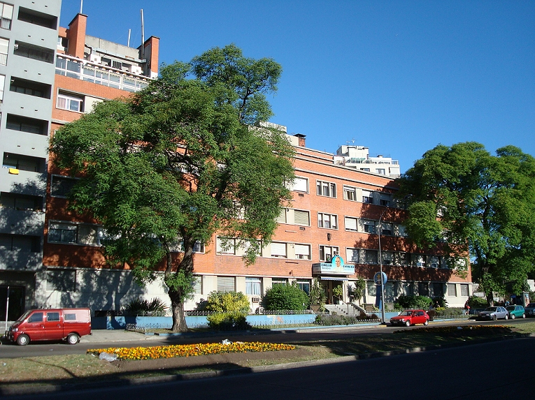 Sanatorio Juan Pablo II (ex Larghero), Círculo Católico de Obreros, Bulevar Artigas, La Comercial, Montevideo, Uruguay.